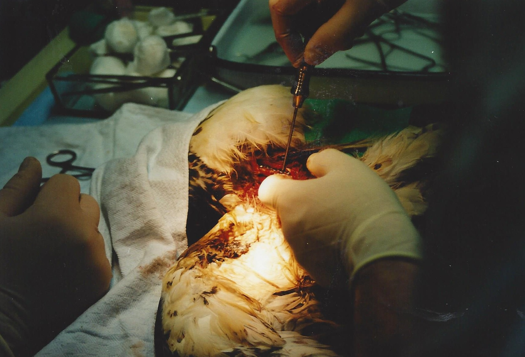 Osteosynthese einer gebrochenen Bussardschwinge (Ulna) mit Miniplatte, tierärztliche Praxis Frank Liebig, Röbel/Müritz